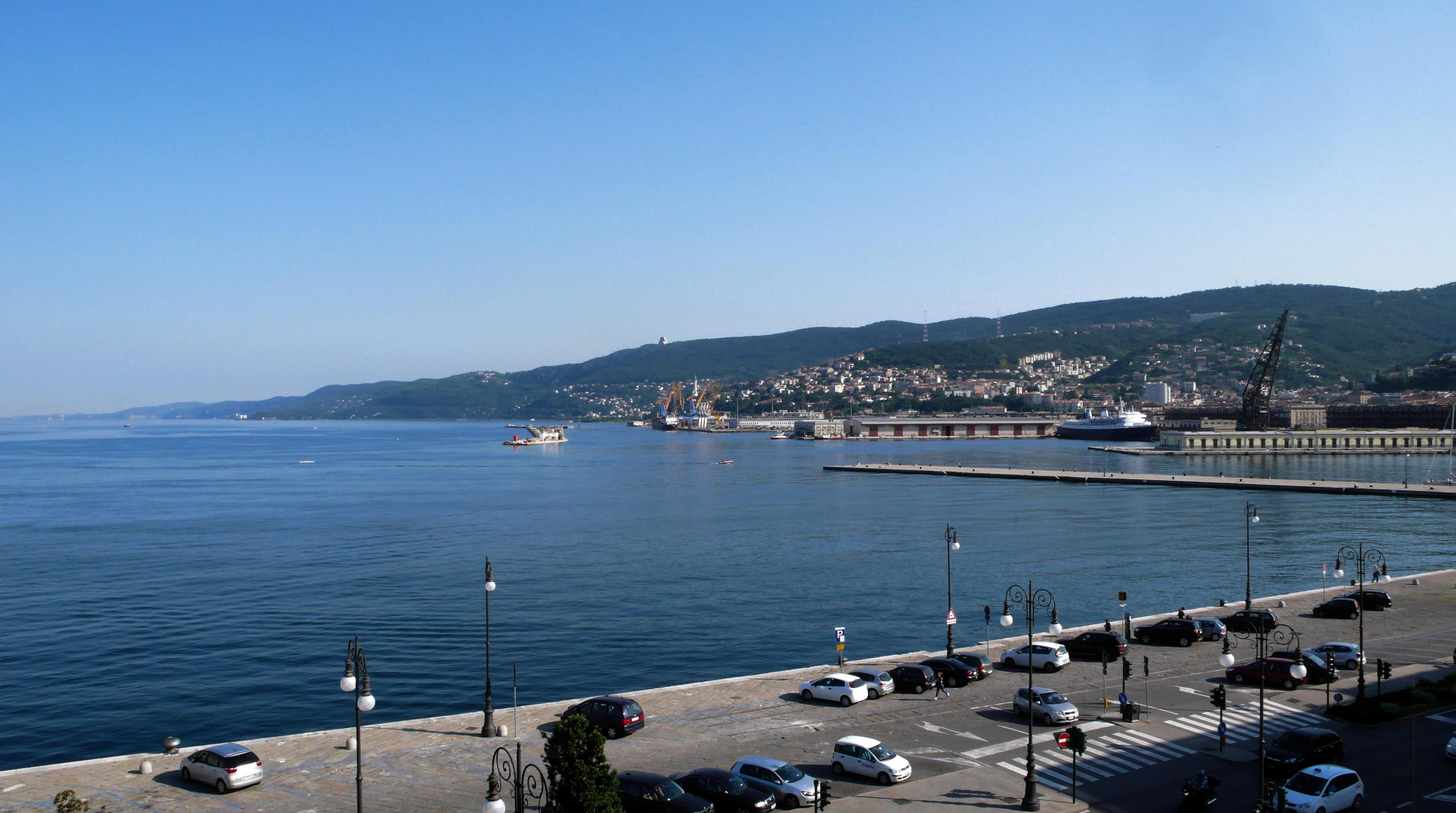 Triest, Hafen